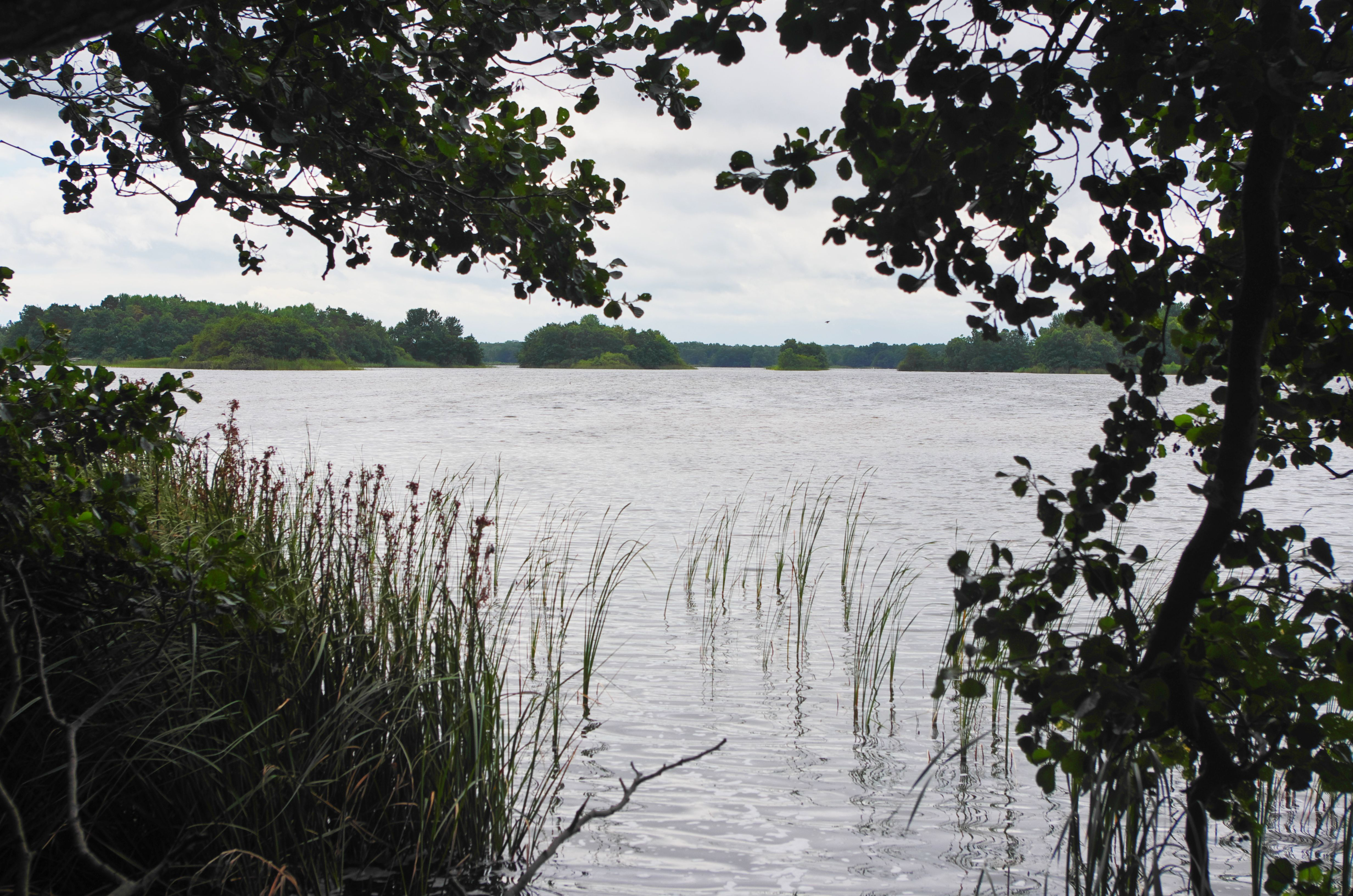 Sjön Hornsjön, Hornssjön eller Hornsviken på Öland i Borgholms kommun i Sverige.